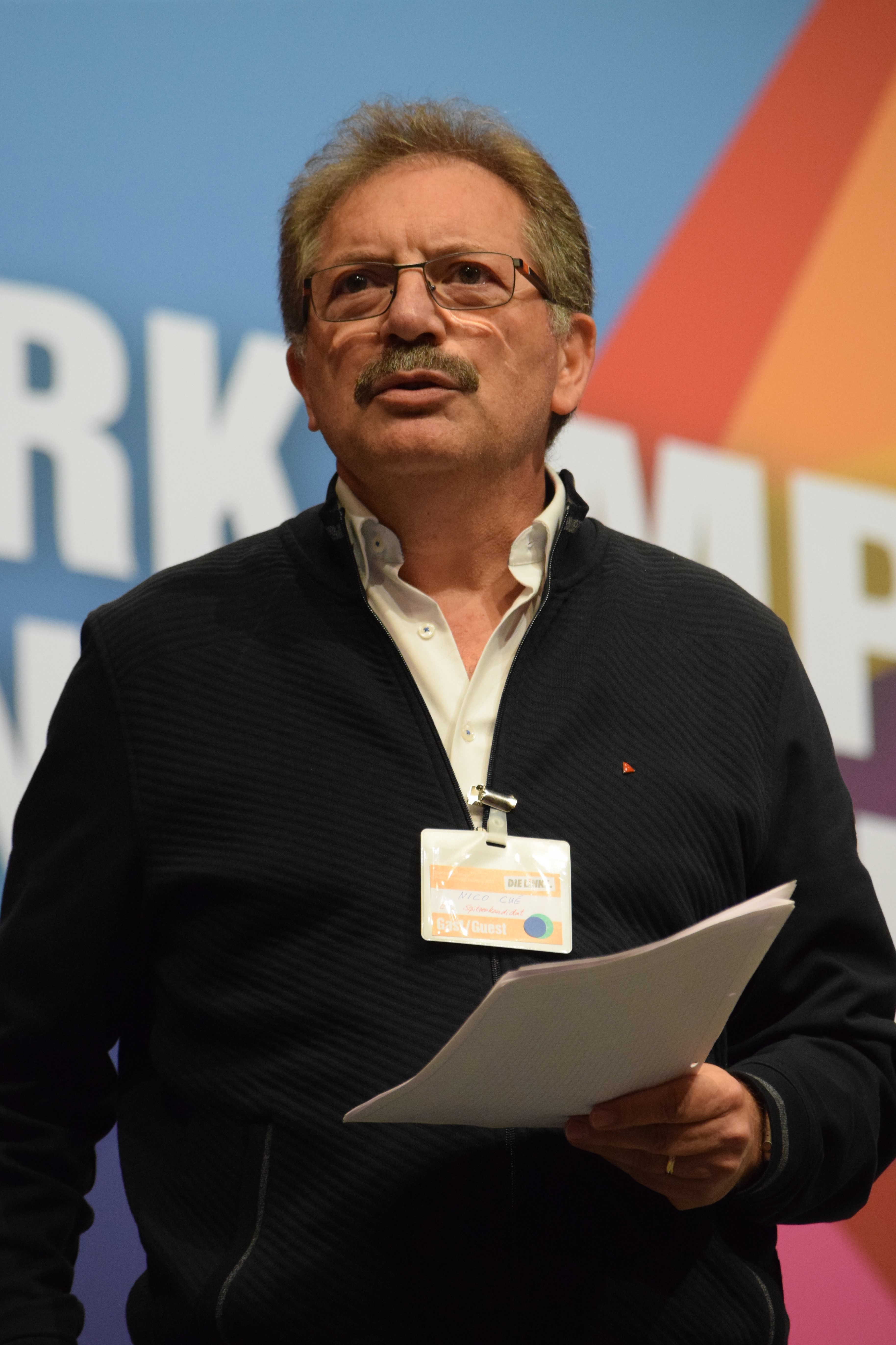 Der belgische Gewerkschafter Nico Cué, Spitzenkandidat für den Vorsitz der Europäischen Kommission im Namen der Europäischen Linken (EL). Auf auf dem Parteitag der Linkspartei in Bonn. 2. Tagung des 6. Parteitages der Partei DIE LINKE, 22. und 23. Februar 2019, Bonn.